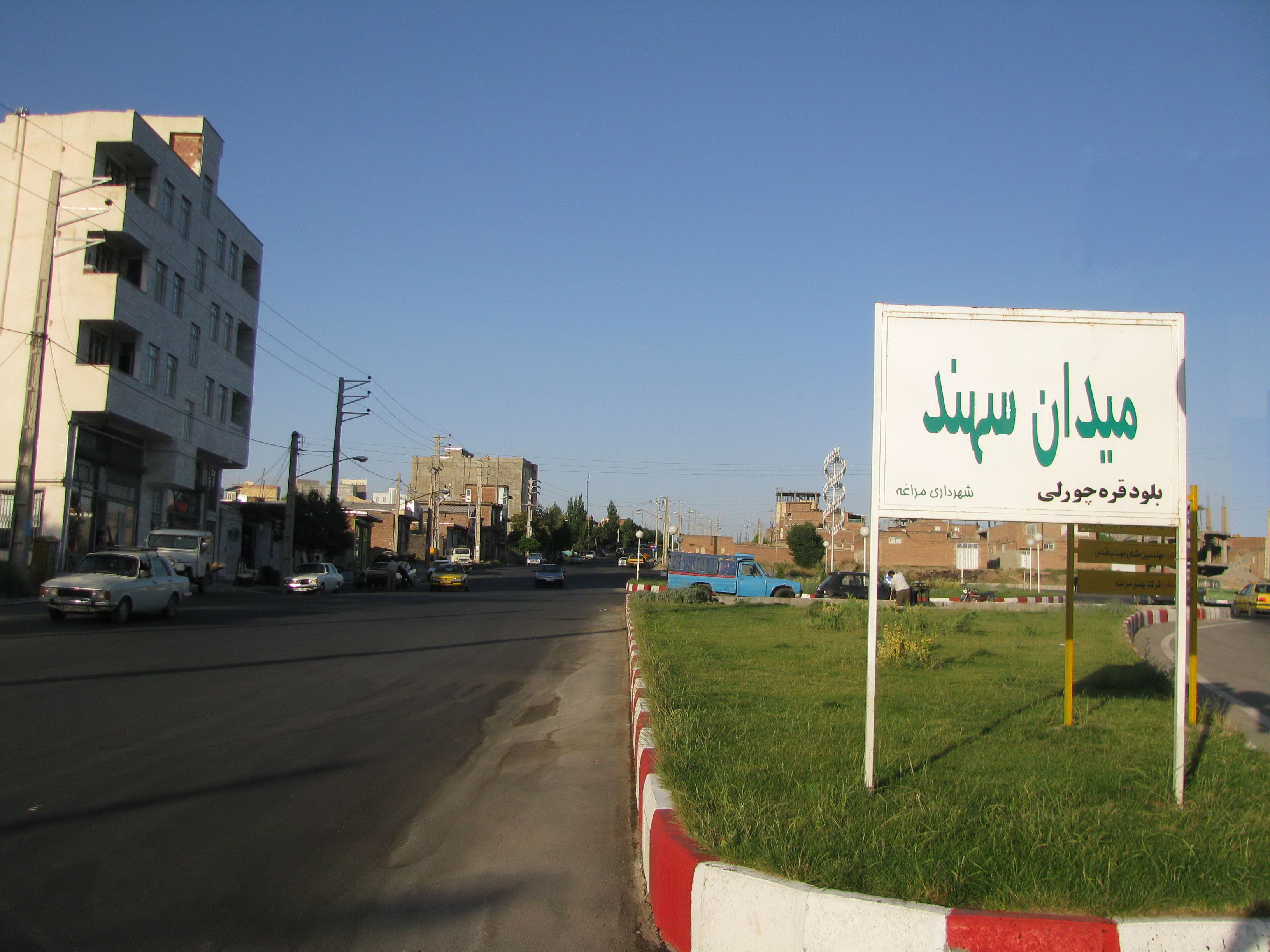 میدان بولود قاراچورلو در مراغه